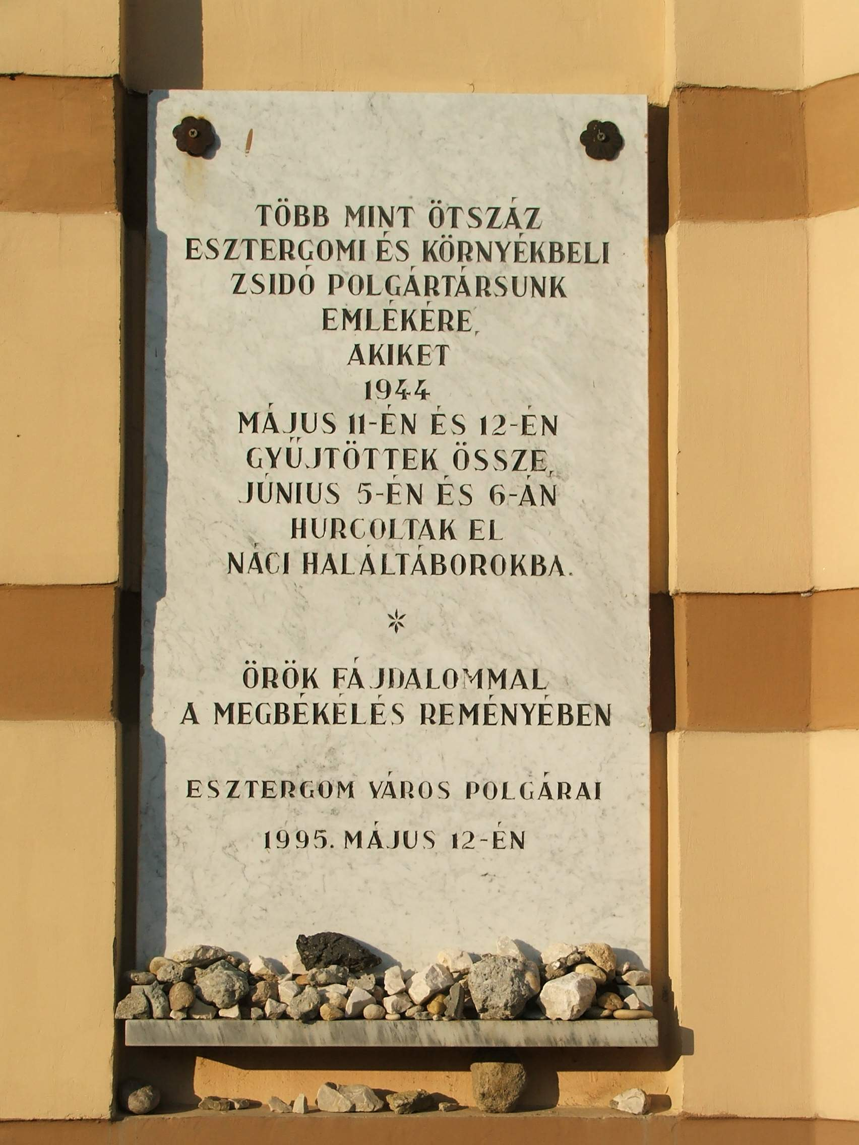 Emléktábla a Zsinagóga falán